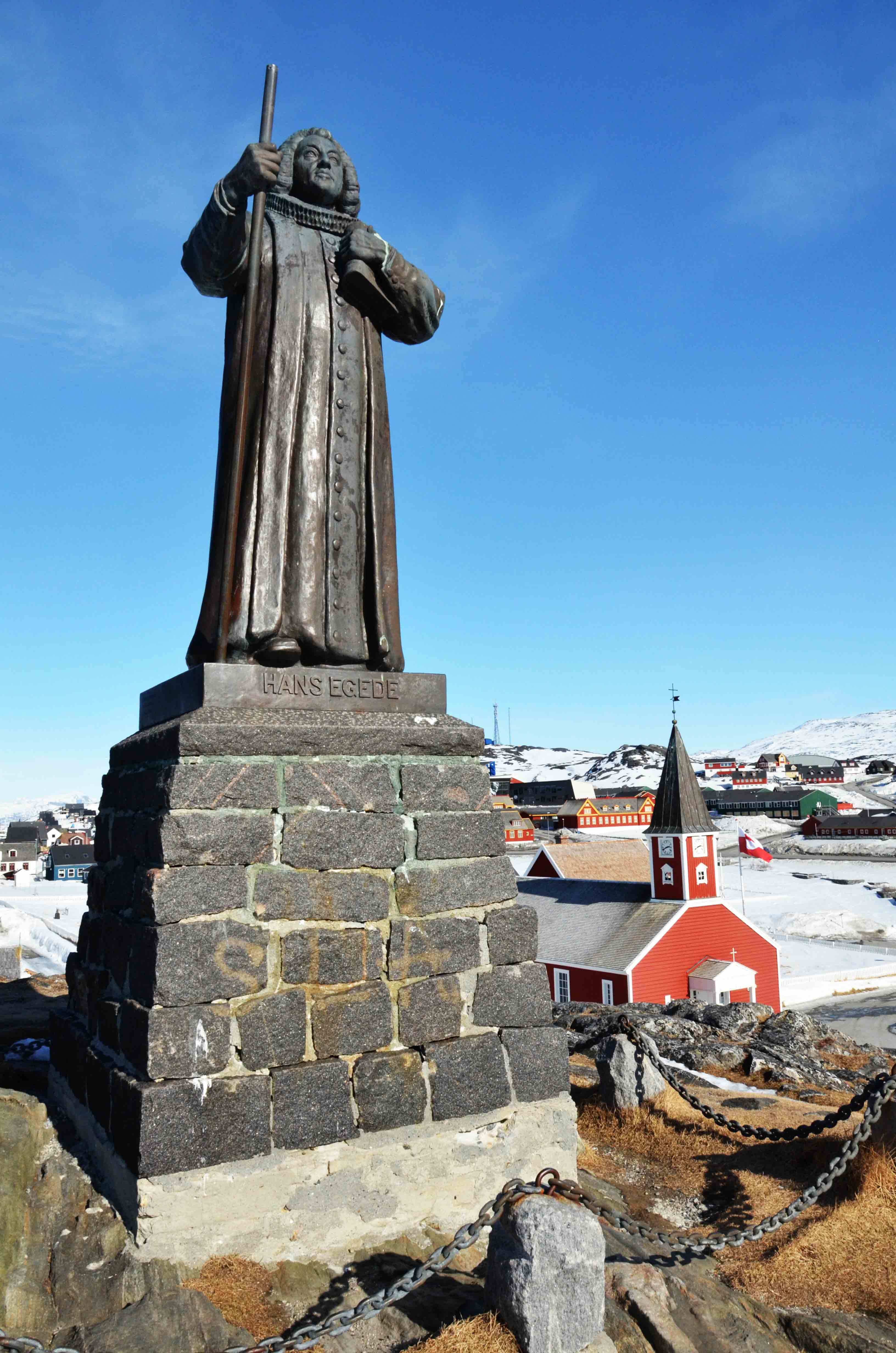 Pomnik założyciela Nuuk, Hansa Egede